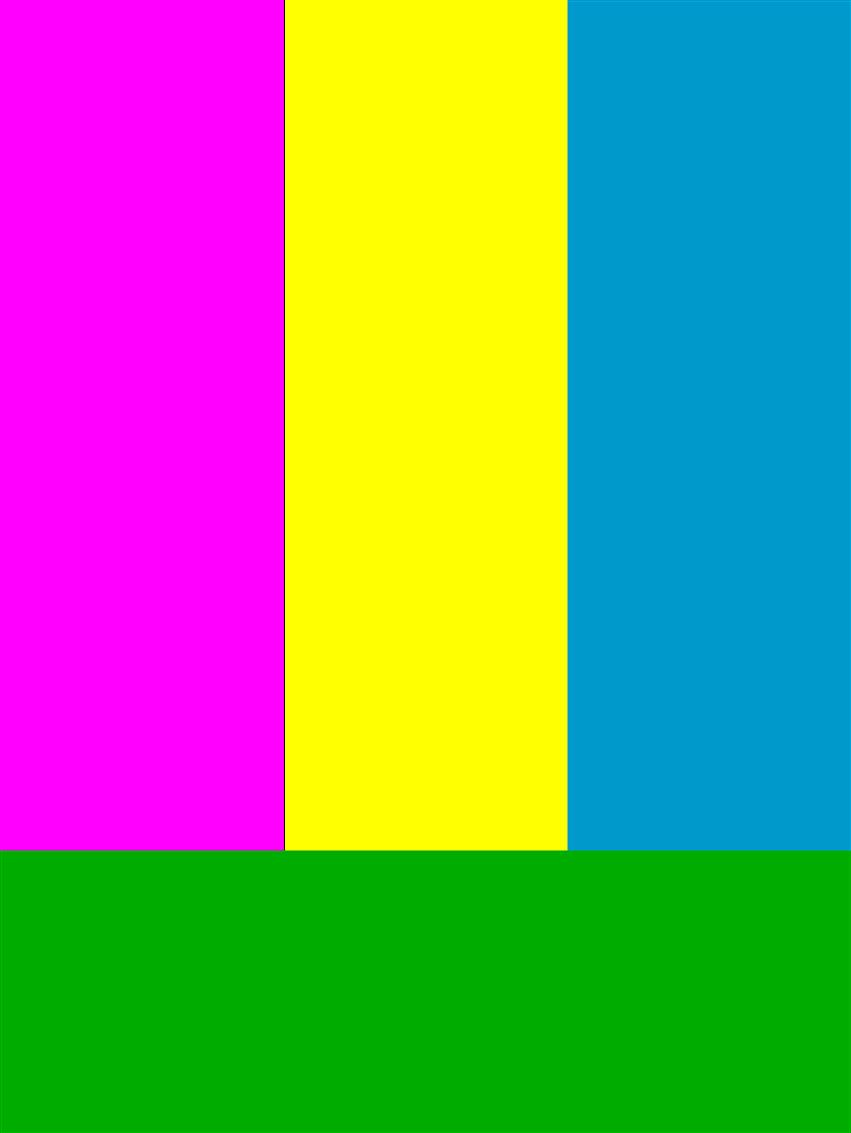 Farbe-an-sich-Kontrast